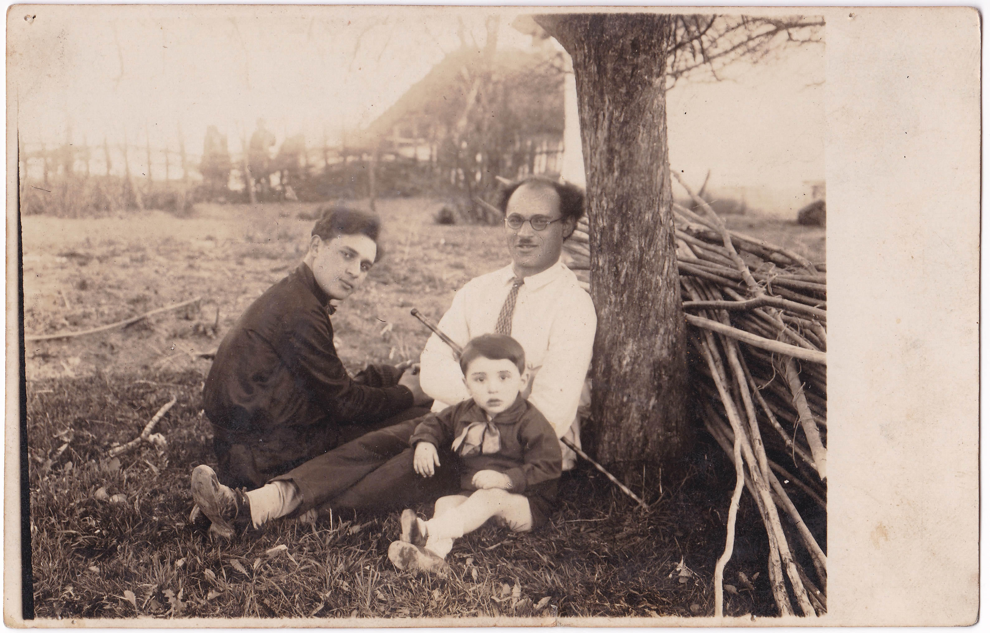 הילד מיכאל (מוניה) אוליצקי, לייב אוליצקי האח הבכור, וברוך אוליצקי (משמאל)